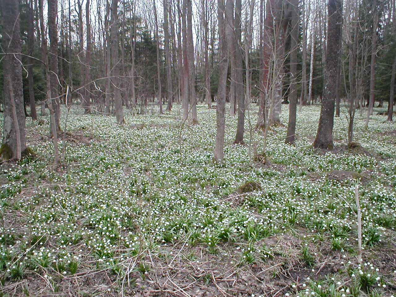 Les bledulí v NPR Ransko